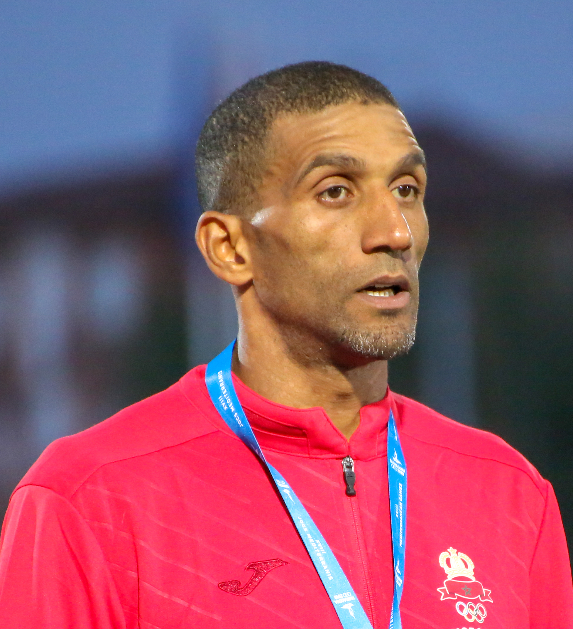 Yahya Berrabah en los Juegos del Mediterráneo 2018